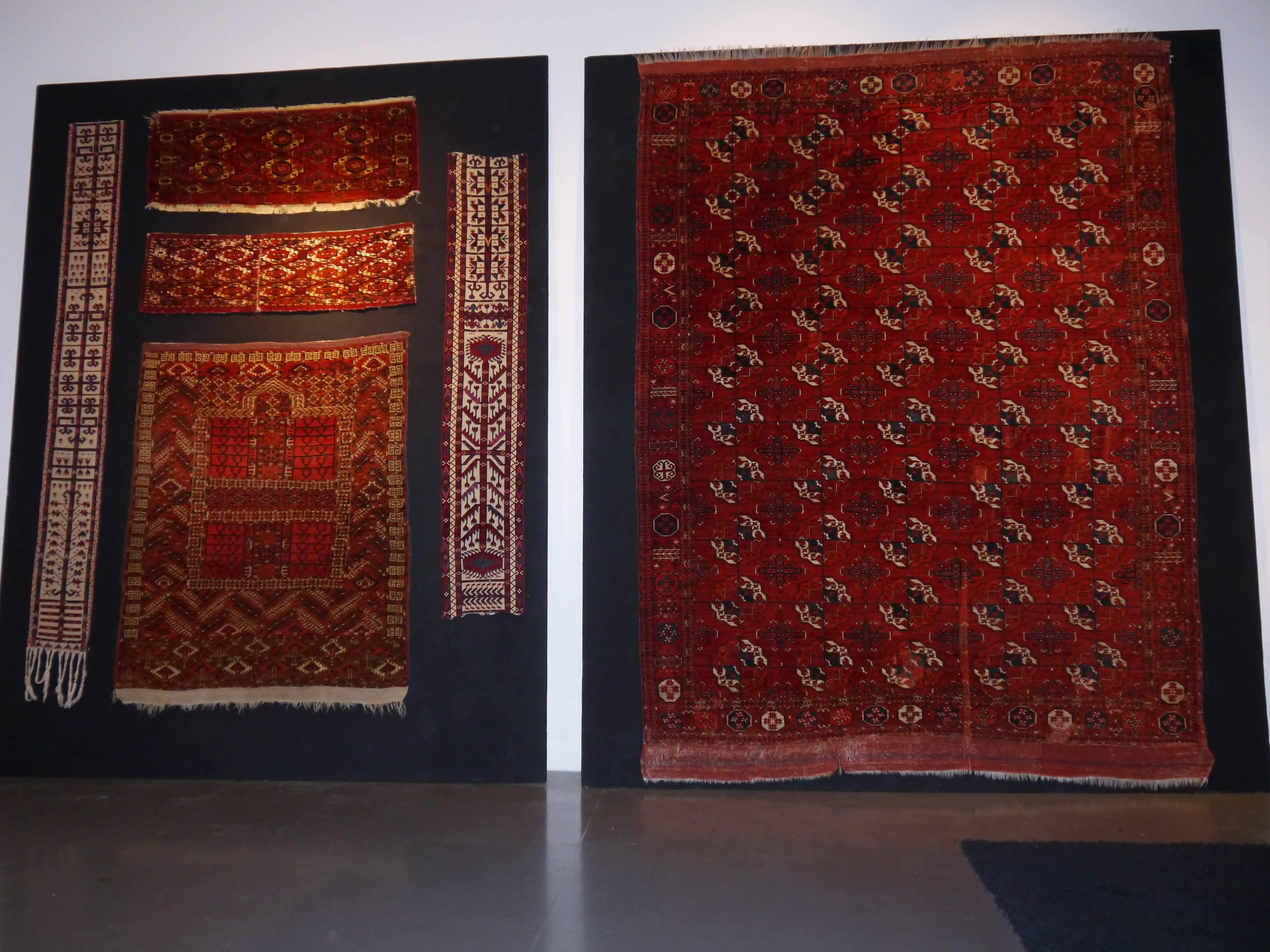 Turkmenische Teppiche aus einer Chemnitzer Sammlung: Ausgestellt 2015 in Dresden zum 100. Teppichabend im Völkerkunde Museum in Dresden- im Japanischem Palais .Von Links nach Rechts: Zeltbandfragment der Tekke Turkmenen, seinerzeit in der Galerie Eberhart Herrmman München gekauft und von diesem den Tekke zugeordnet - Mitte oben eine Tekke Torba mit 15 Göls, wohl die zweite vom bekannten Hoffmeister Stück aus dem sehr empfehlenswerten Buch von Elena Tsareva ,,Turkmen Carpets" über die Sammlung Hoffmeister ( Herr Hoffmeister war Gast beim 100.Teppichabend ...) Darunter eine Smith Group Torba erste Hälfte 19th. Darunter ein Tekke Ensi- Wahrscheinlich von Mutter und Tocher geknüpft- die Rechte Seite des Ensis ist sichbar von einer unerfahrenen Knüpferin geknüpft . Daneben rechts ein Zelbandfragment der Salor -ein weiteres Stück dieses äußerst seltenen Bandes war seinerzeit in der Sammlung Jonathan Broido- die 3 äußeren Bodüren dieses Bandes sind durchgeknüpft . Ganz rechts ein wunderschöner und früher Tekke Hauptteppich mit tiefen Farben,feiner Knüpfung und tuchartigem Griff . Um oder vor 1800. Selten hier die Stellung der Farben im Tekkehauptgöl .